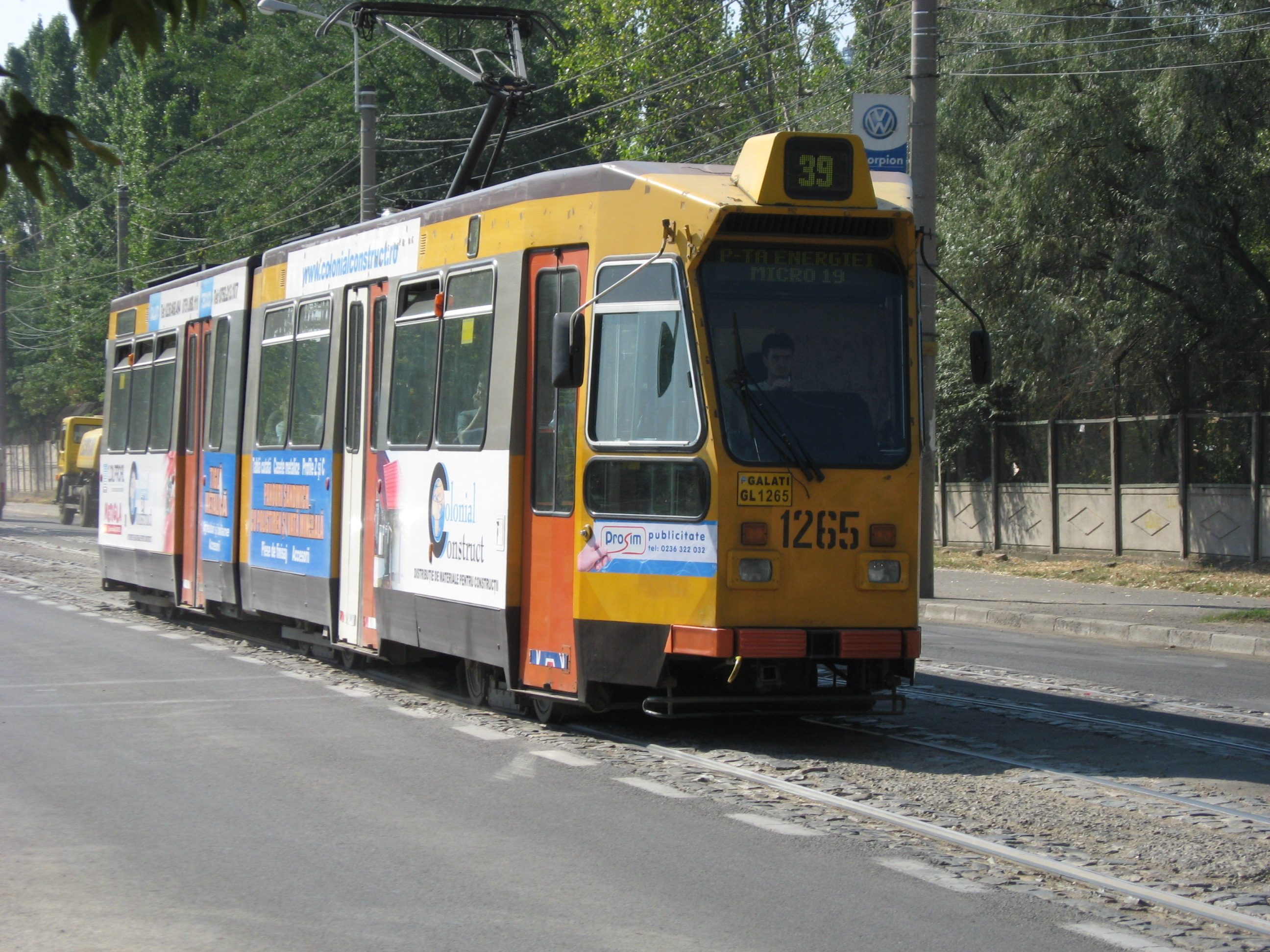 Tramvaiul Transurb #1265 (GL 1265) marca Duewag-Holec provenit din Rotterdam (Olanda)